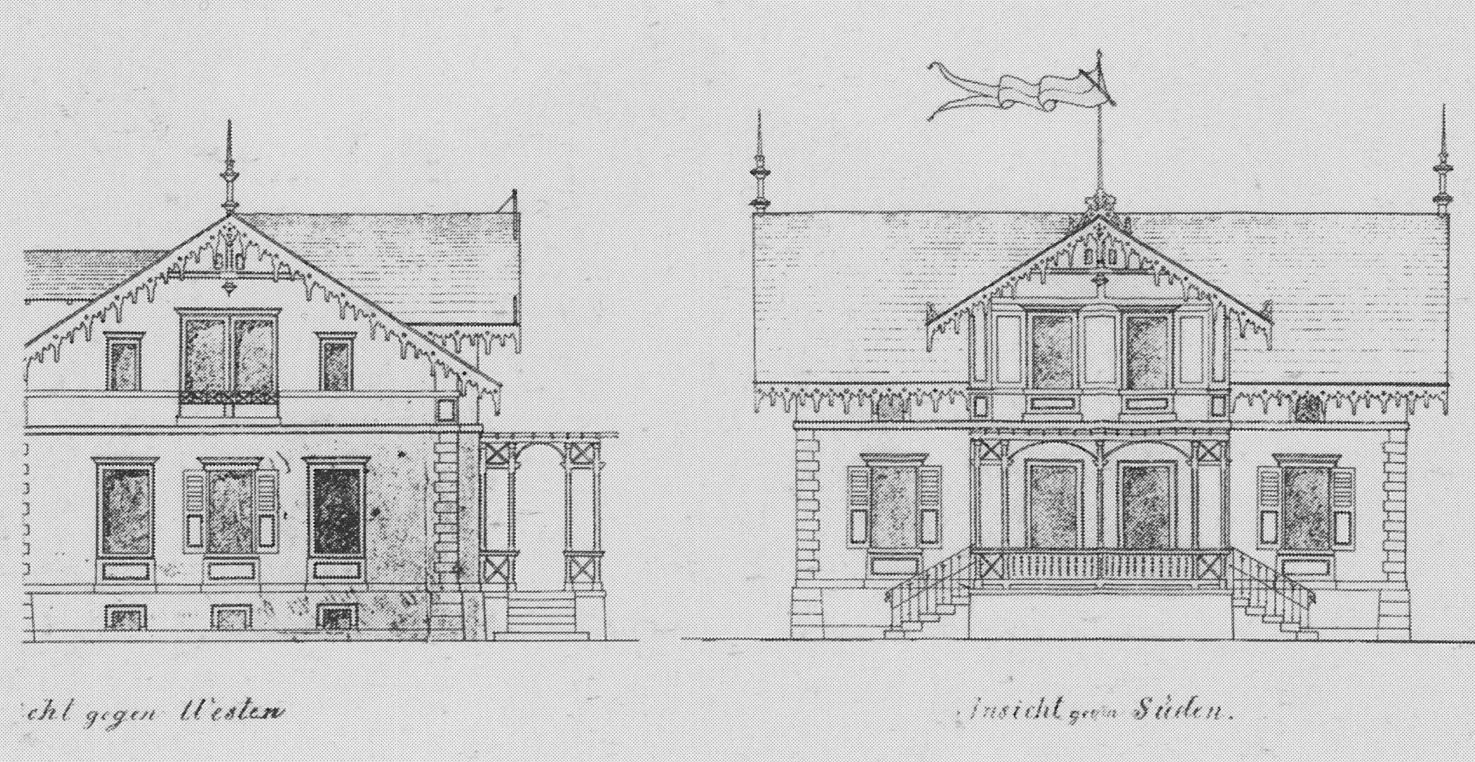 Radebeul Bennostr 23 Bauzeichnung 1873